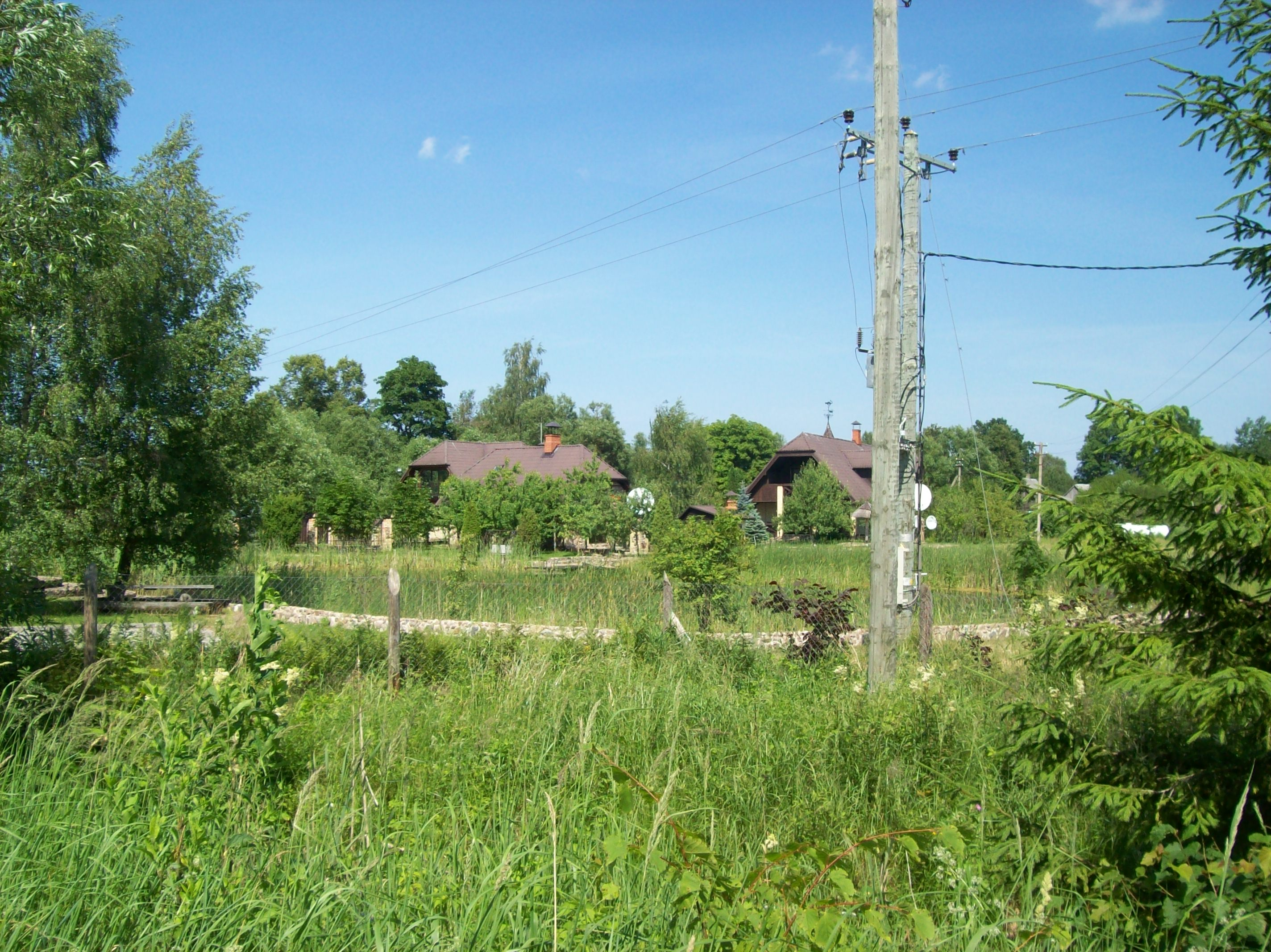 Antiņciems, Lapmežciema pagasts, LV-3118, Latvia